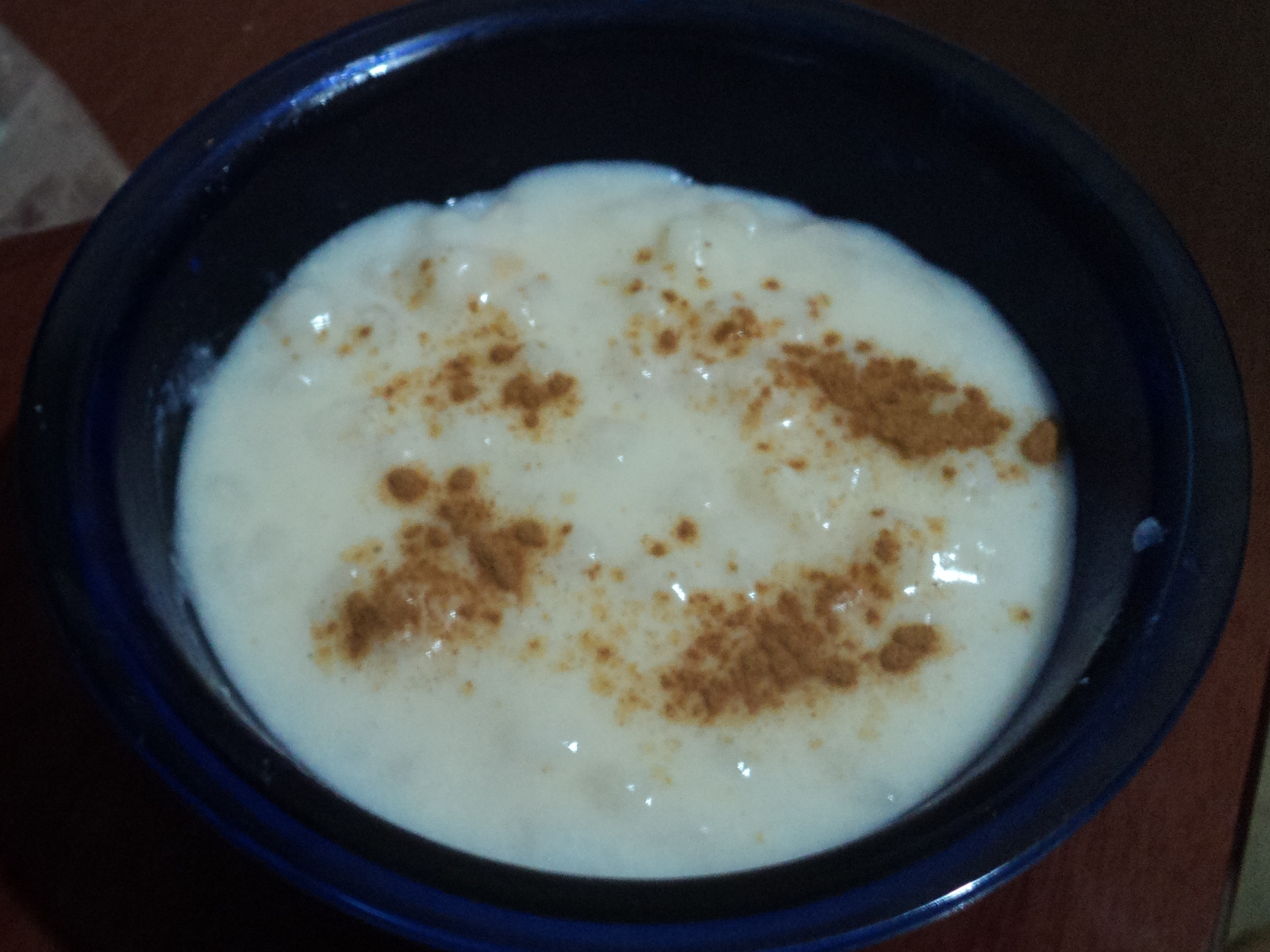 Munguzá, manguzá ou canjica